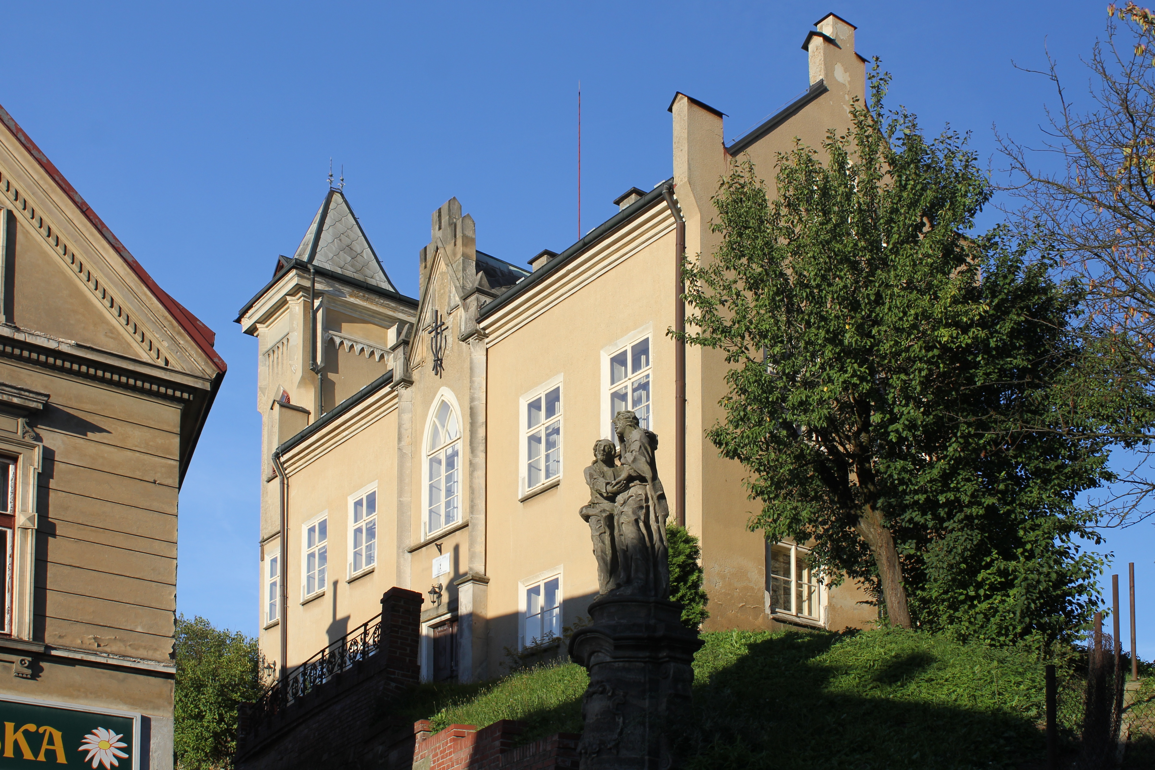 Husův sbor, Český Dub